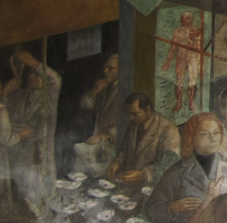 Alejandro Lipschutz (al centro, con mano en barbilla) retratado en el mural "Historia de la medicina y la farmacia en Chile" (Concepción, 1957-58), de Julio Escámez.